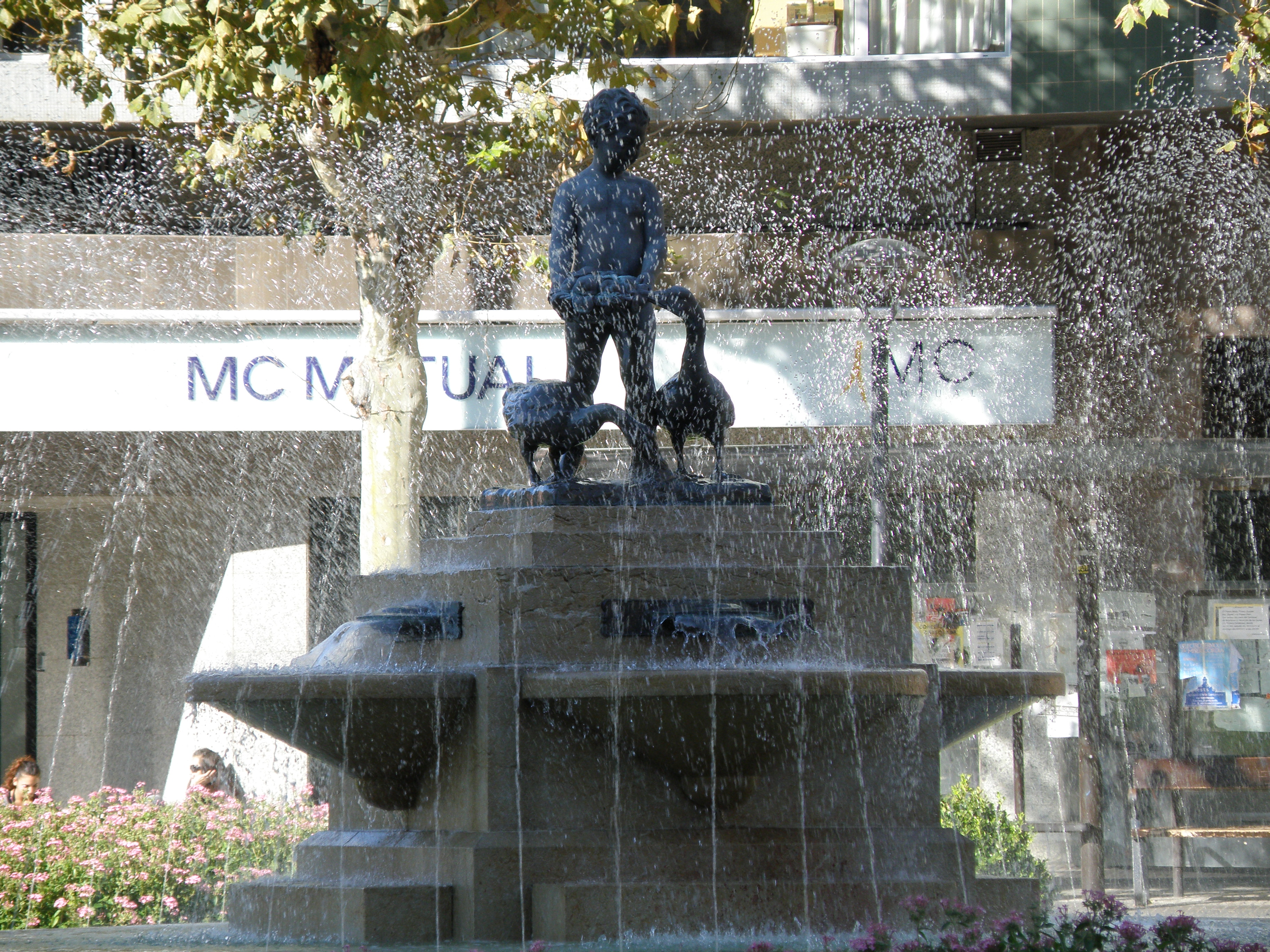 Nen de les oques - Reus, Baix Camp.